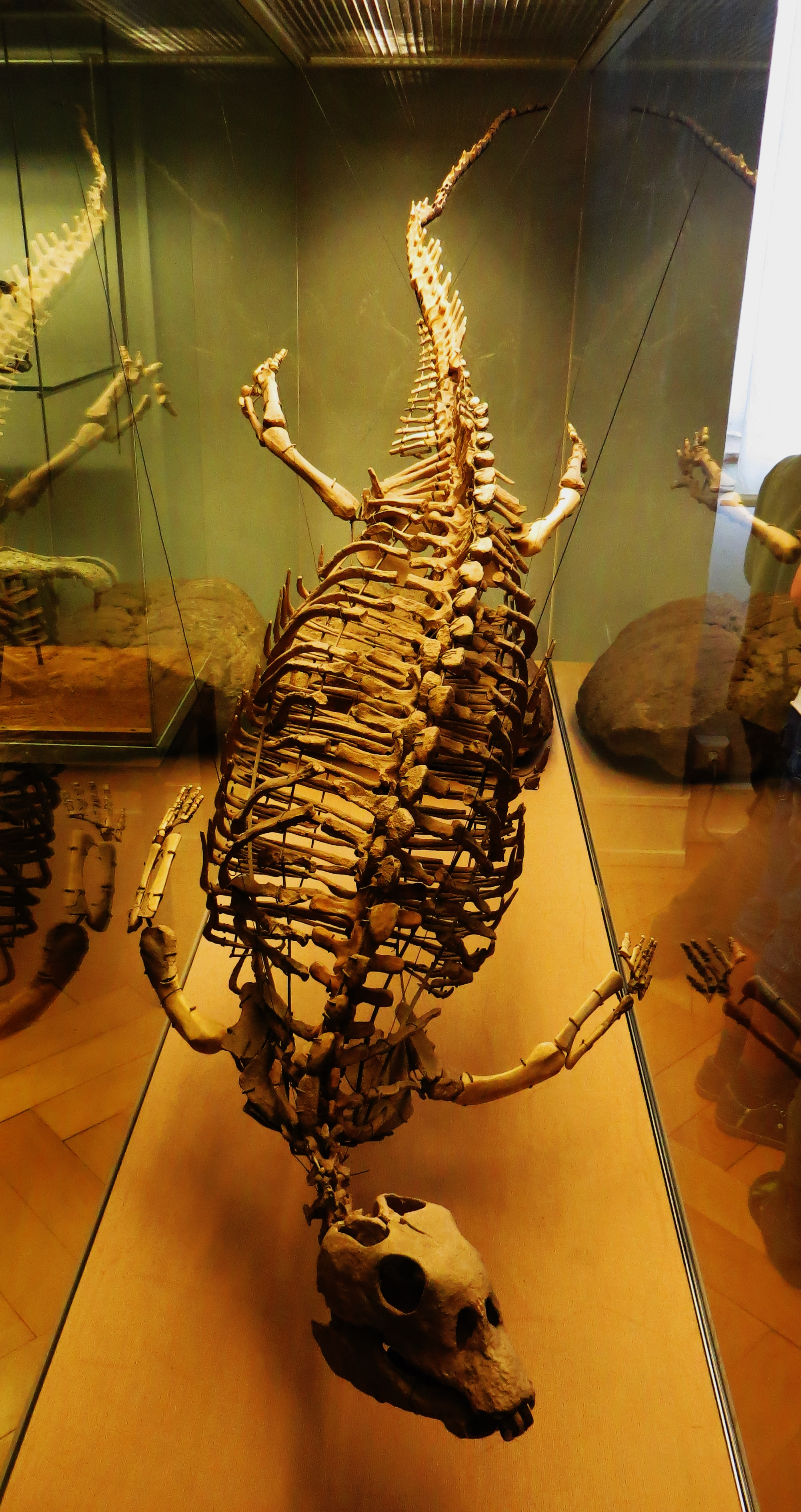 Fossil of Placodus, an extinct reptile - Took the picture at Museum of Paleontology, Tuebingen